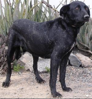 Bardina